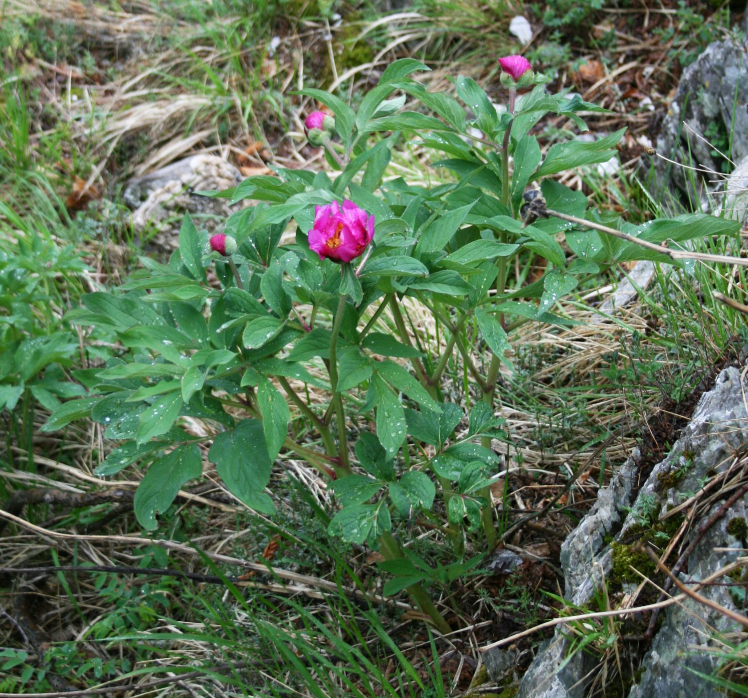 Echte Pfingstrose (Paeonia officinalis subsp. officinalis), Pfingstrosengewächse (Paeoniaceae) - Italien/Italia/Italy: Toscana, Prov. Lucca, Parco Regionale delle Alpi Apuane, SE Foce Siggioli, Ostseite des Berges Pizzo d'Uccello